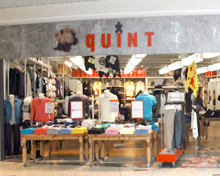 indgangspartiet til en af quint butikkerne